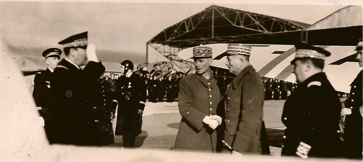 Le général Maxime Weygand accueilli par le général Nogués à sa descente d'avion en 1940 à la BA144 Ain-Arnat / Sétif, salués par le commandant et les officiers de la base.